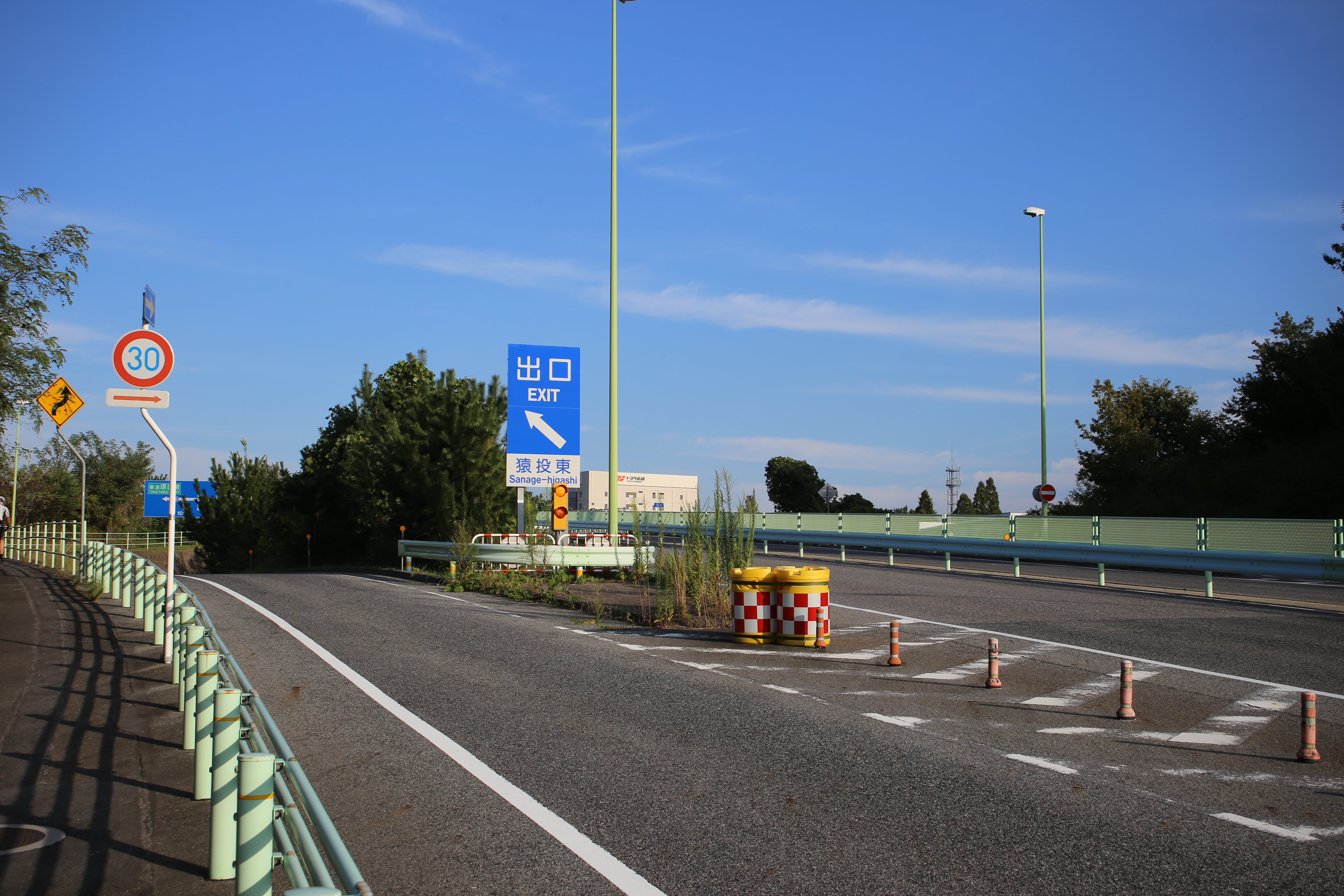 愛知県豊田市猿投町の猿投グリーンロード猿投東インターチェンジ出口